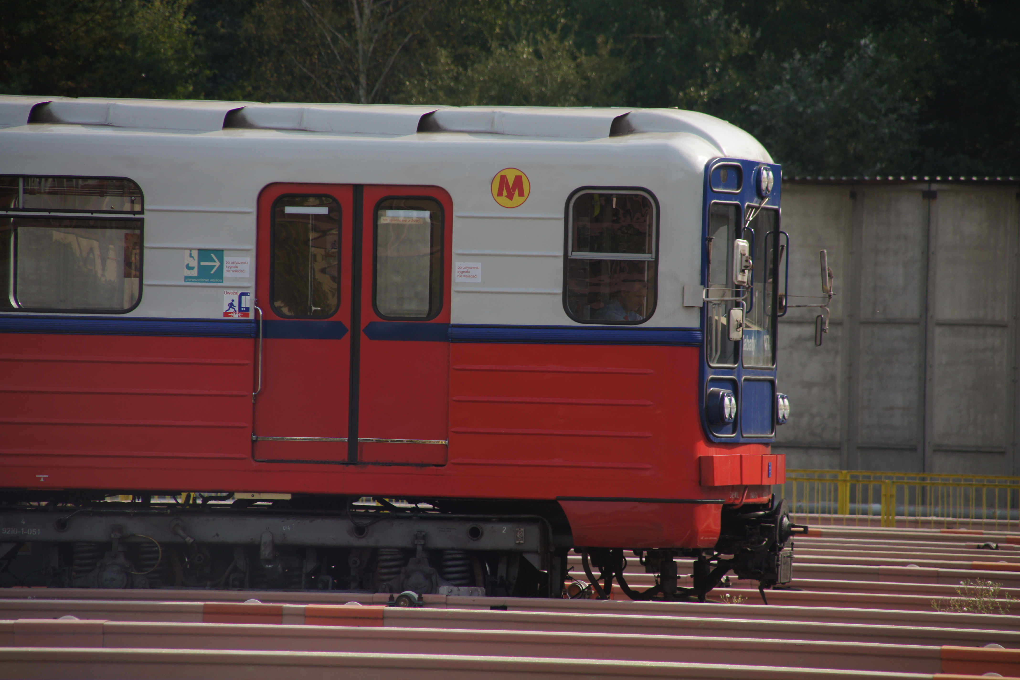 pociąg Metra - Stacja Techniczno-Postojowa Metra na Kabatach